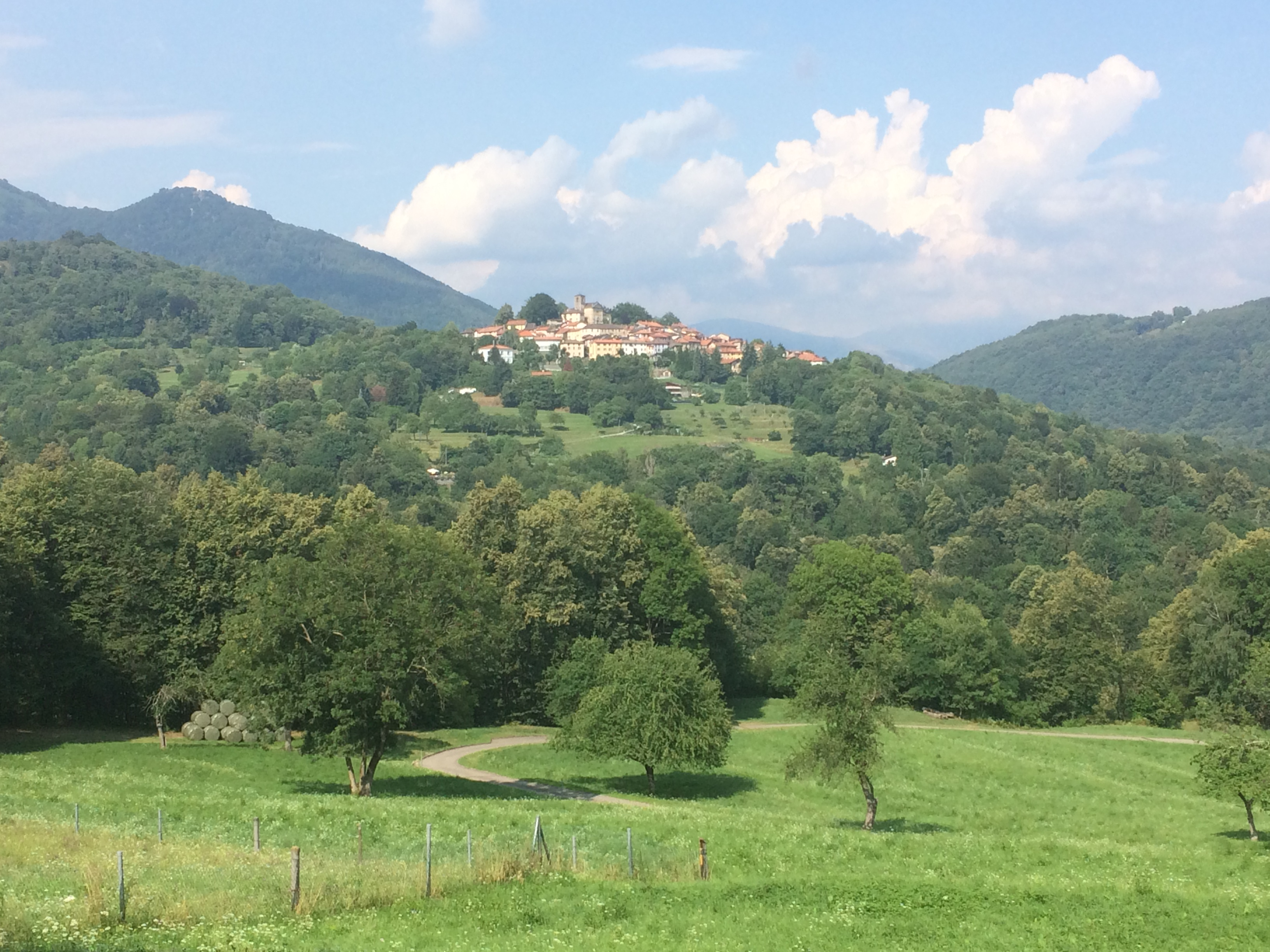 Breno, Malcantone, Ticino (Switzerland)